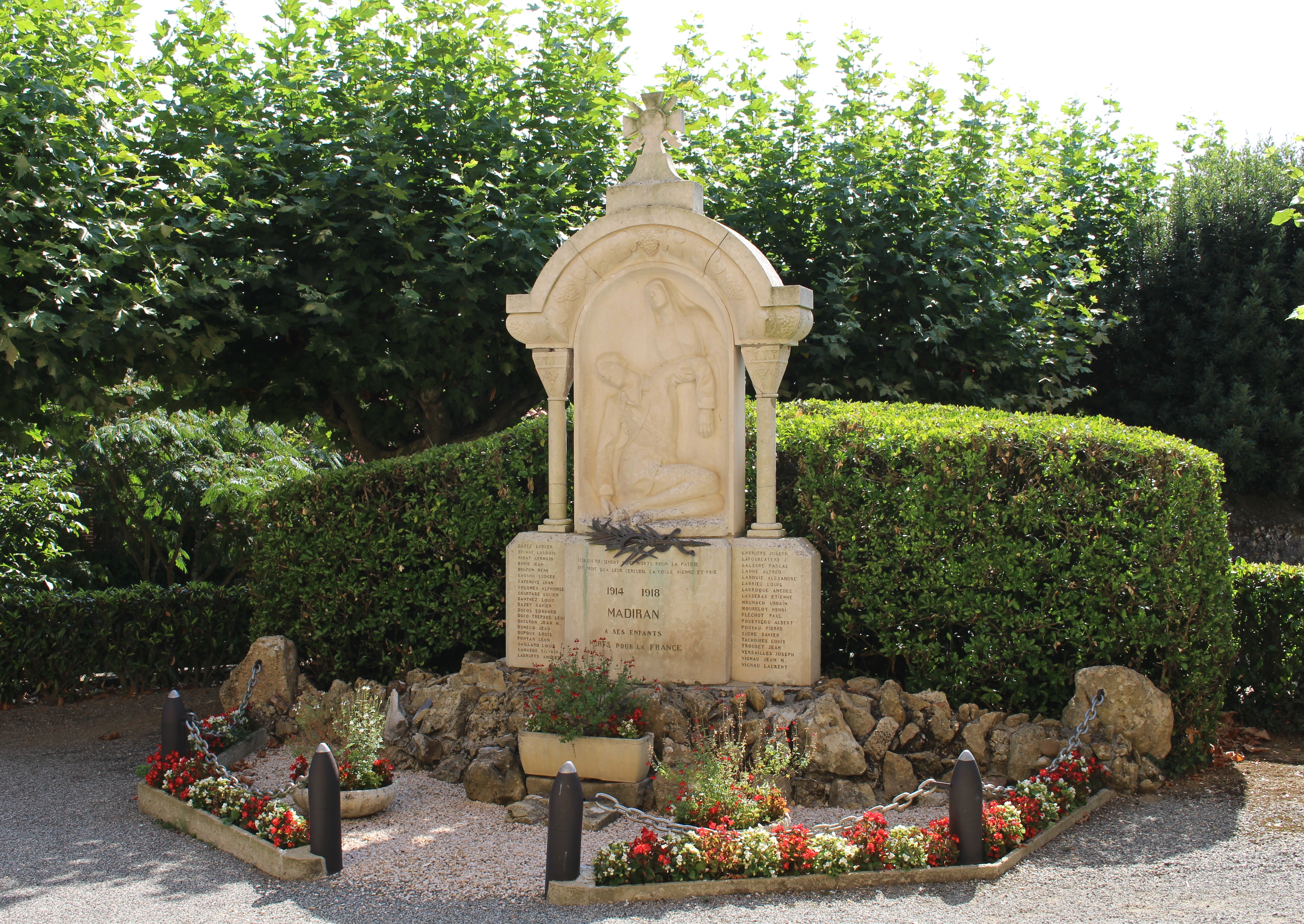 Monument aux morts de Madiran (Hautes-Pyrénées)